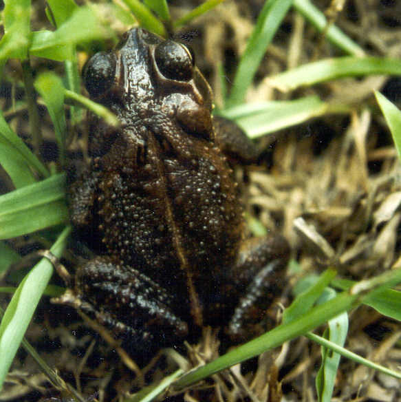 Bufo campbelli